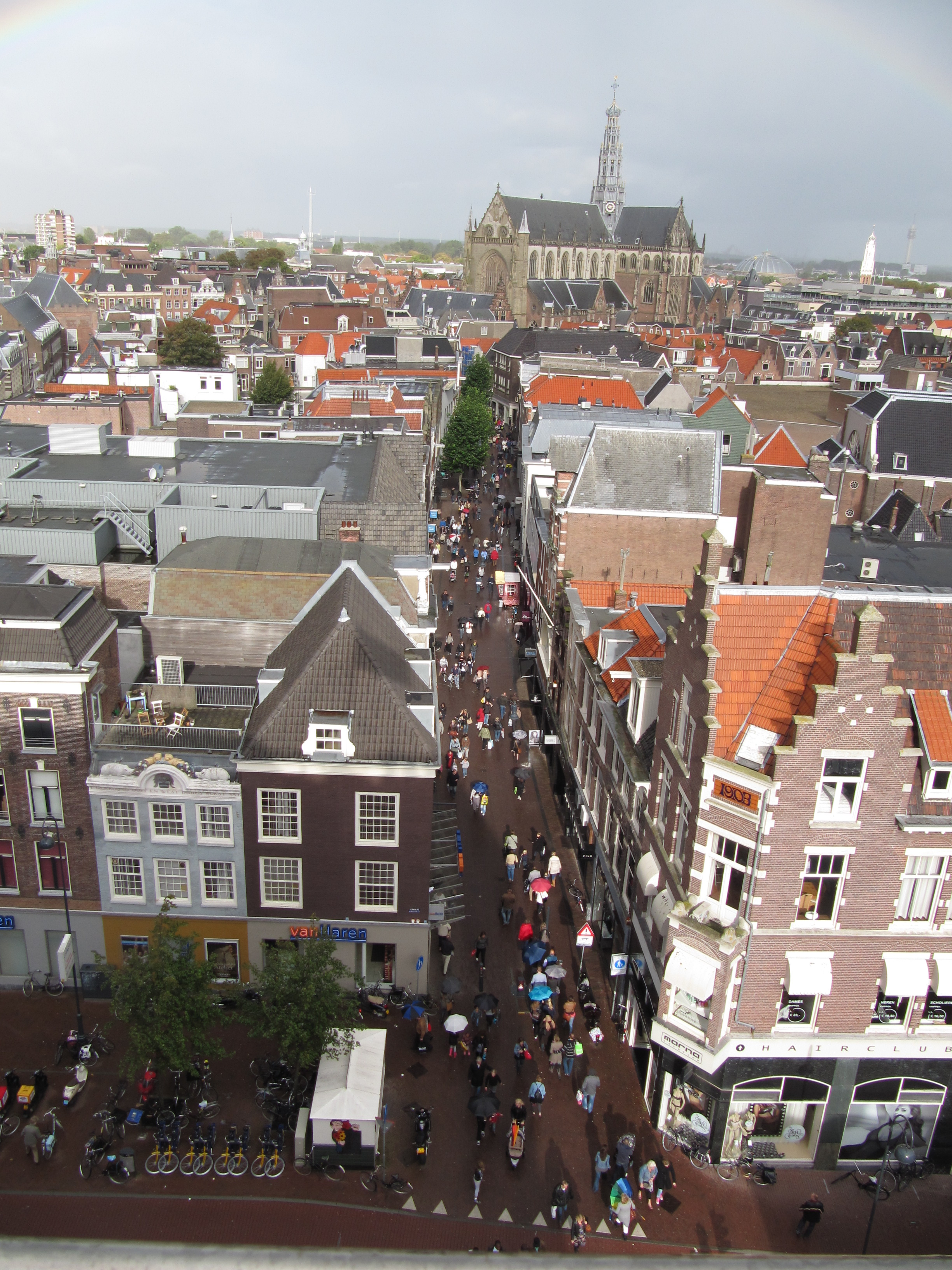 Haarlem - Grote Houtstraat